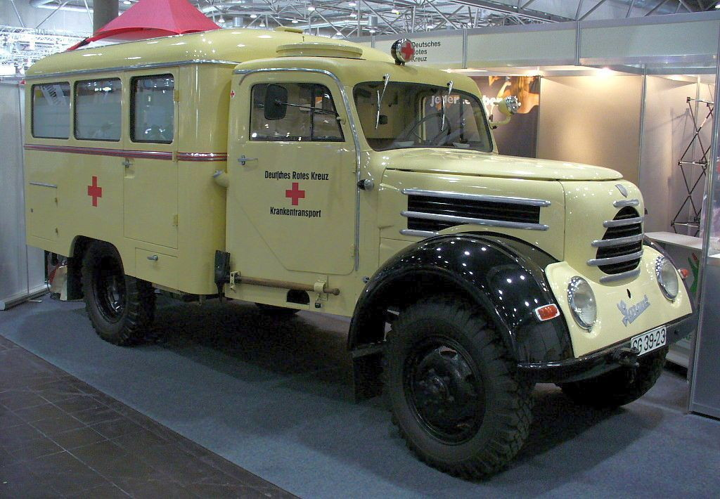 Robur Garant 30K, Allrad Sankra